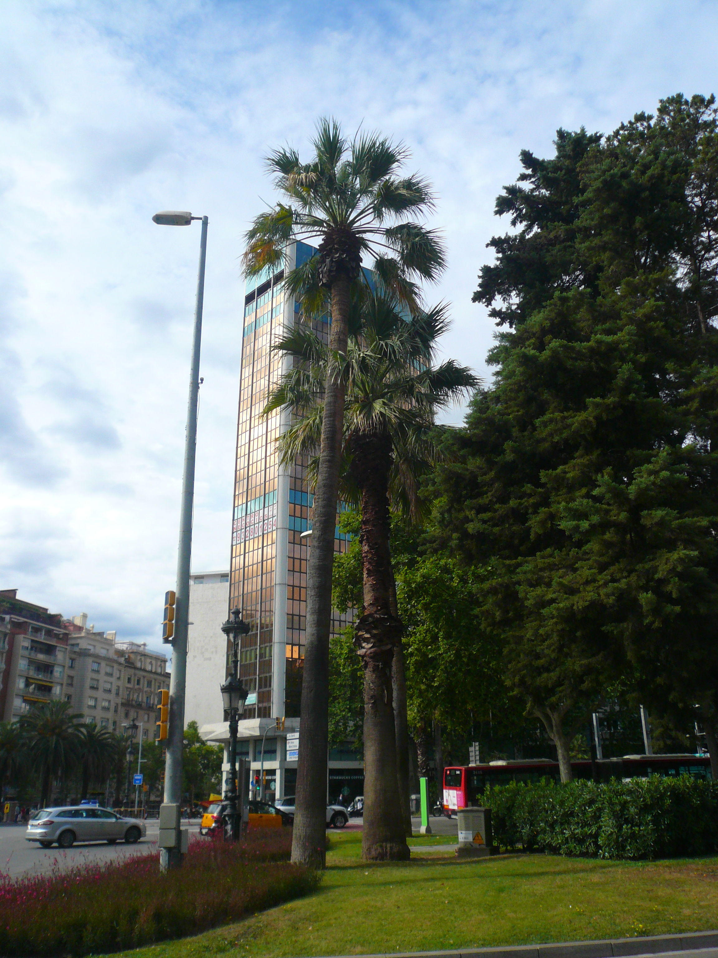 Washingtònies i altres arbres de la Diagonal a la plaça Francesc Macià, fotografiats a la cantonada amb el passeig de Pau Casals (Barcelona) This is a a photo of a protected or outstanding tree in Catalonia, Spain, with id: MA-080193/0026-04-93